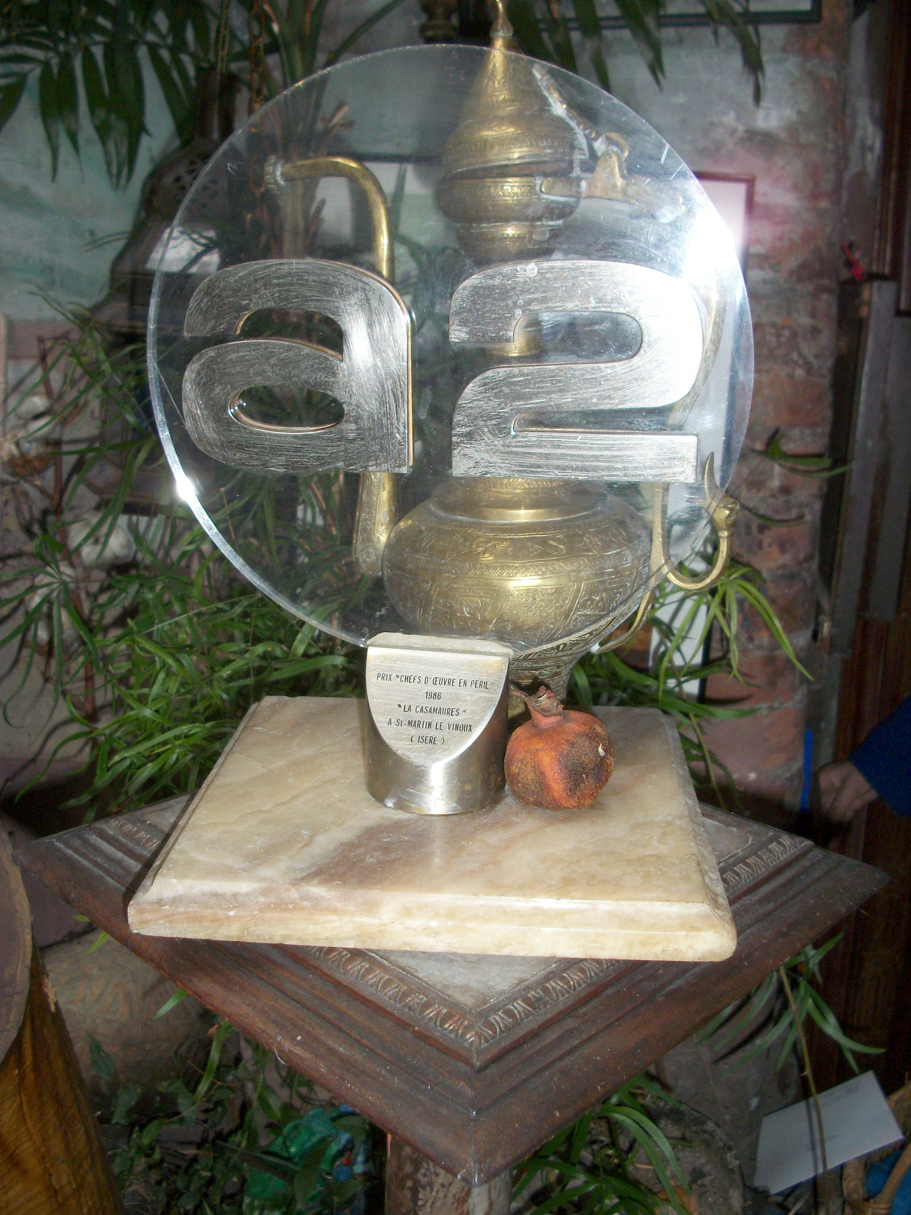 Journées contributives à la Casamaures, Saint-Martin-le-Vinoux, France